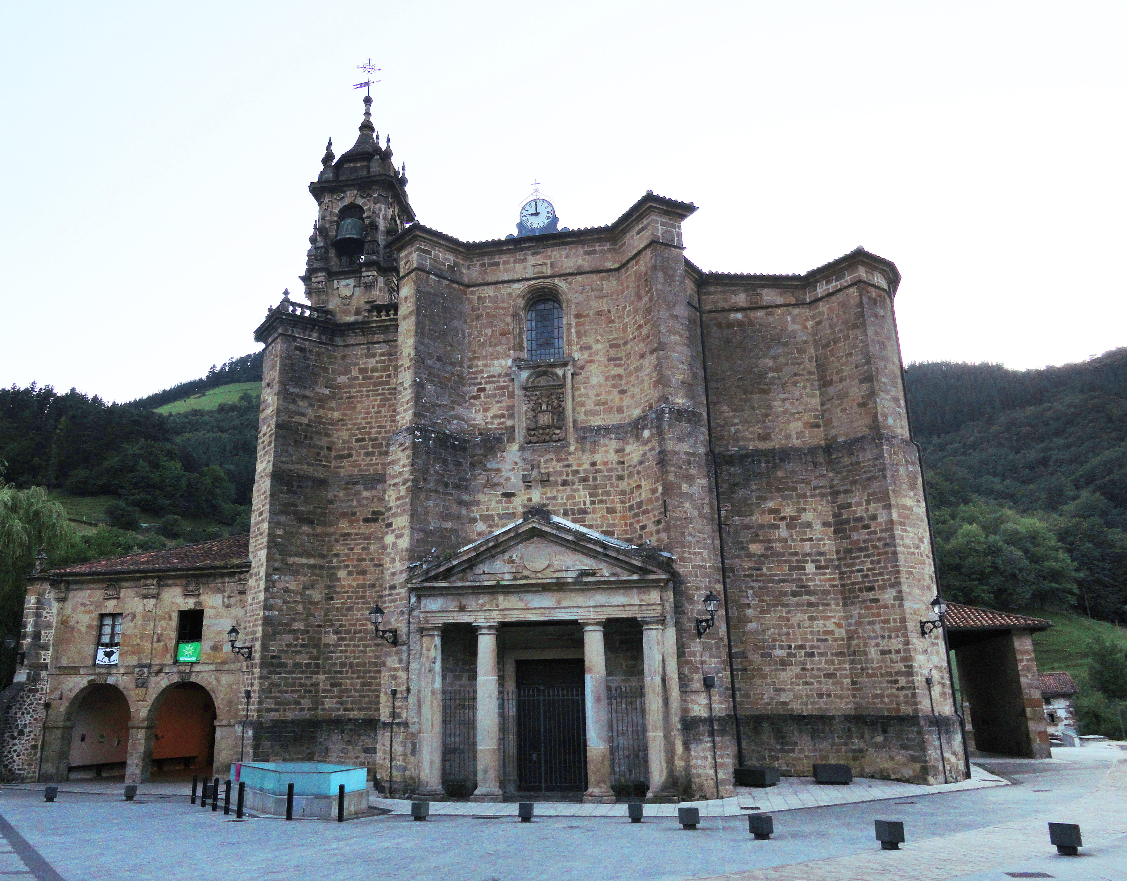 San Martin eliza - Ataun